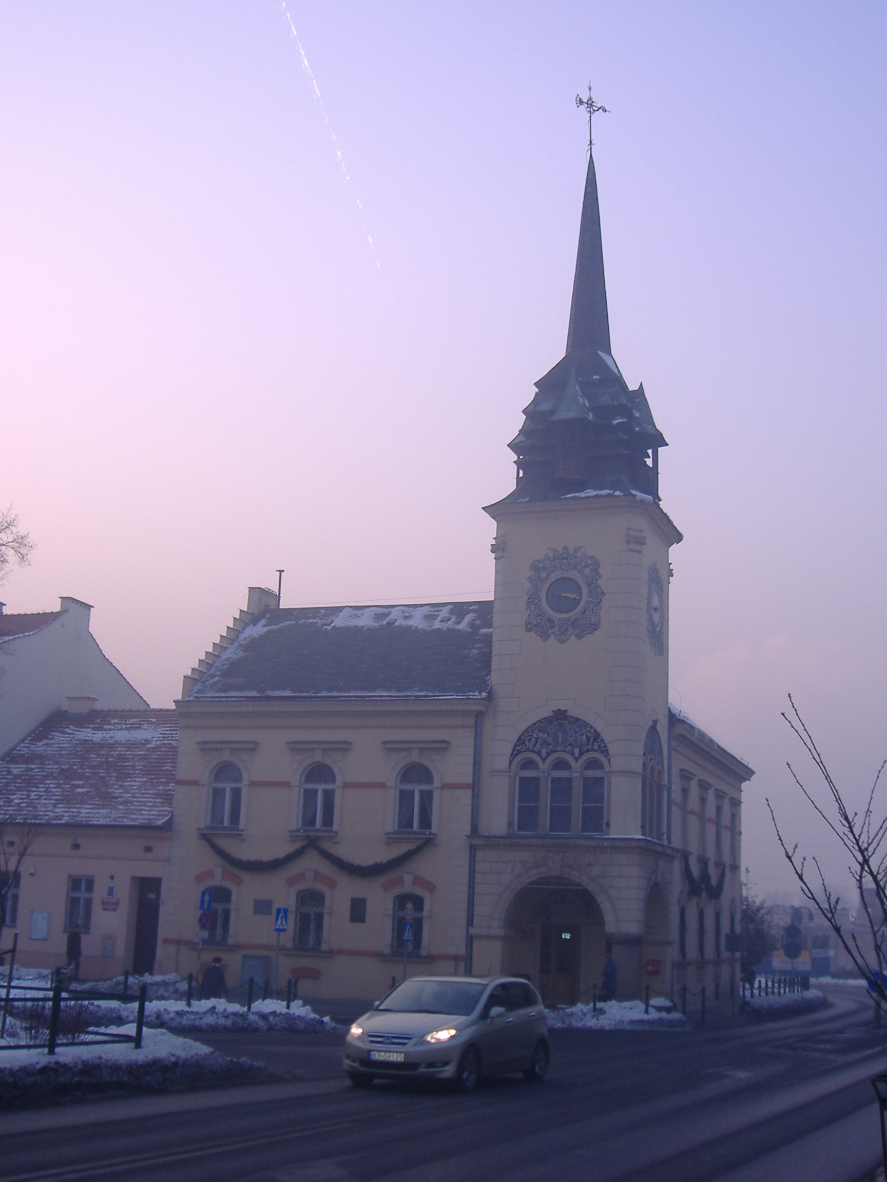 Skawina